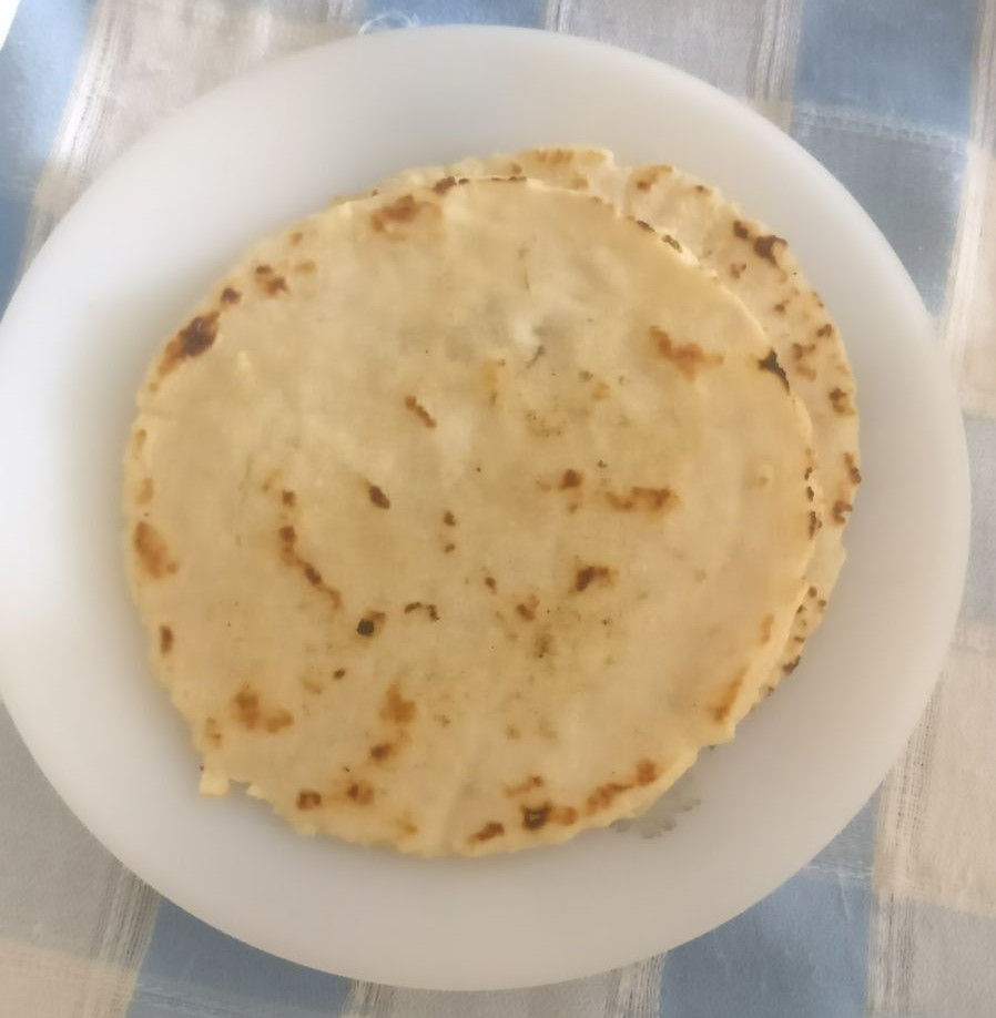 Coques elaborades amb farina de dacsa i blat, aigua, oli i sal. Són tradicionals de la comarca de la Safor.